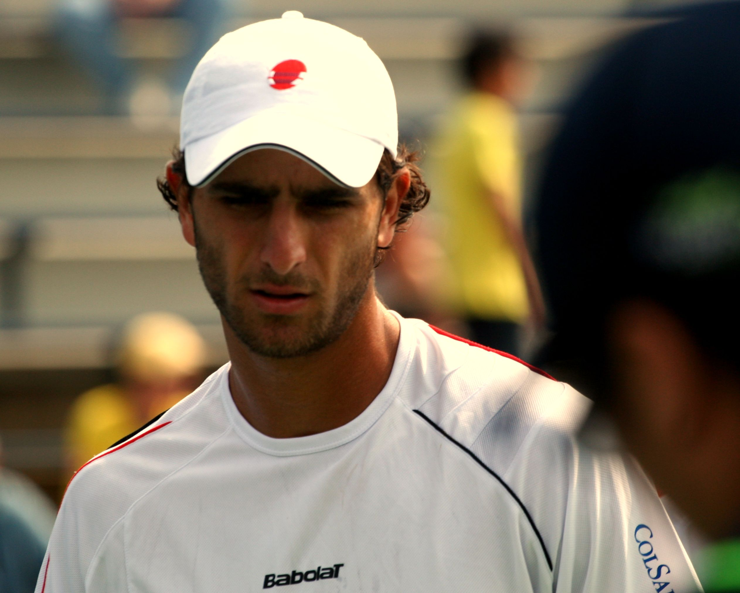 U.S. Open Saturday, Sept. 3, 2011